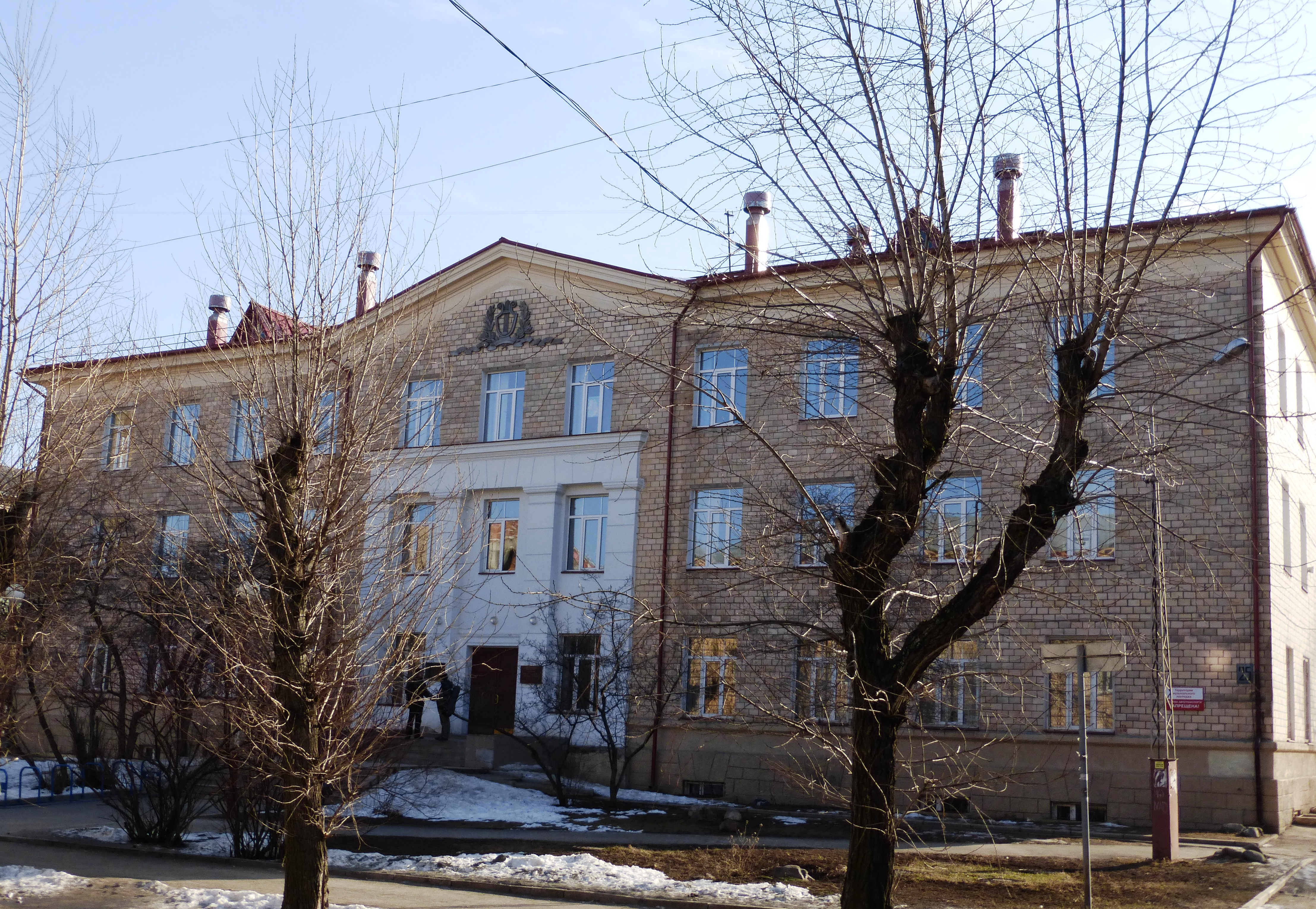 Здание музыкального училища им. К.Э.Раутио в Петрозаводске на ул. Свердлова. Архитектор Рудаков Леонид Ефимович.